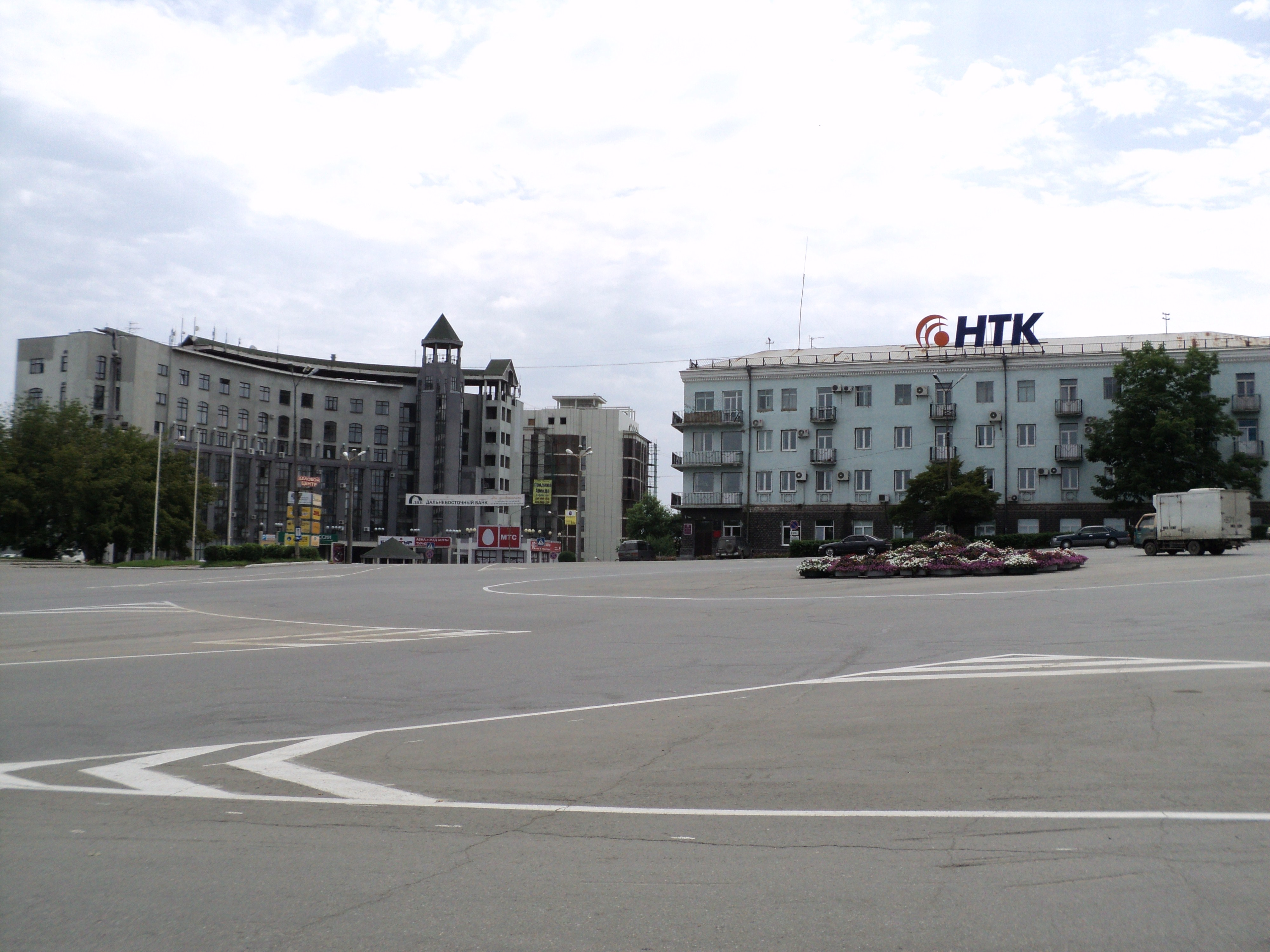 Центральная площадь Находки